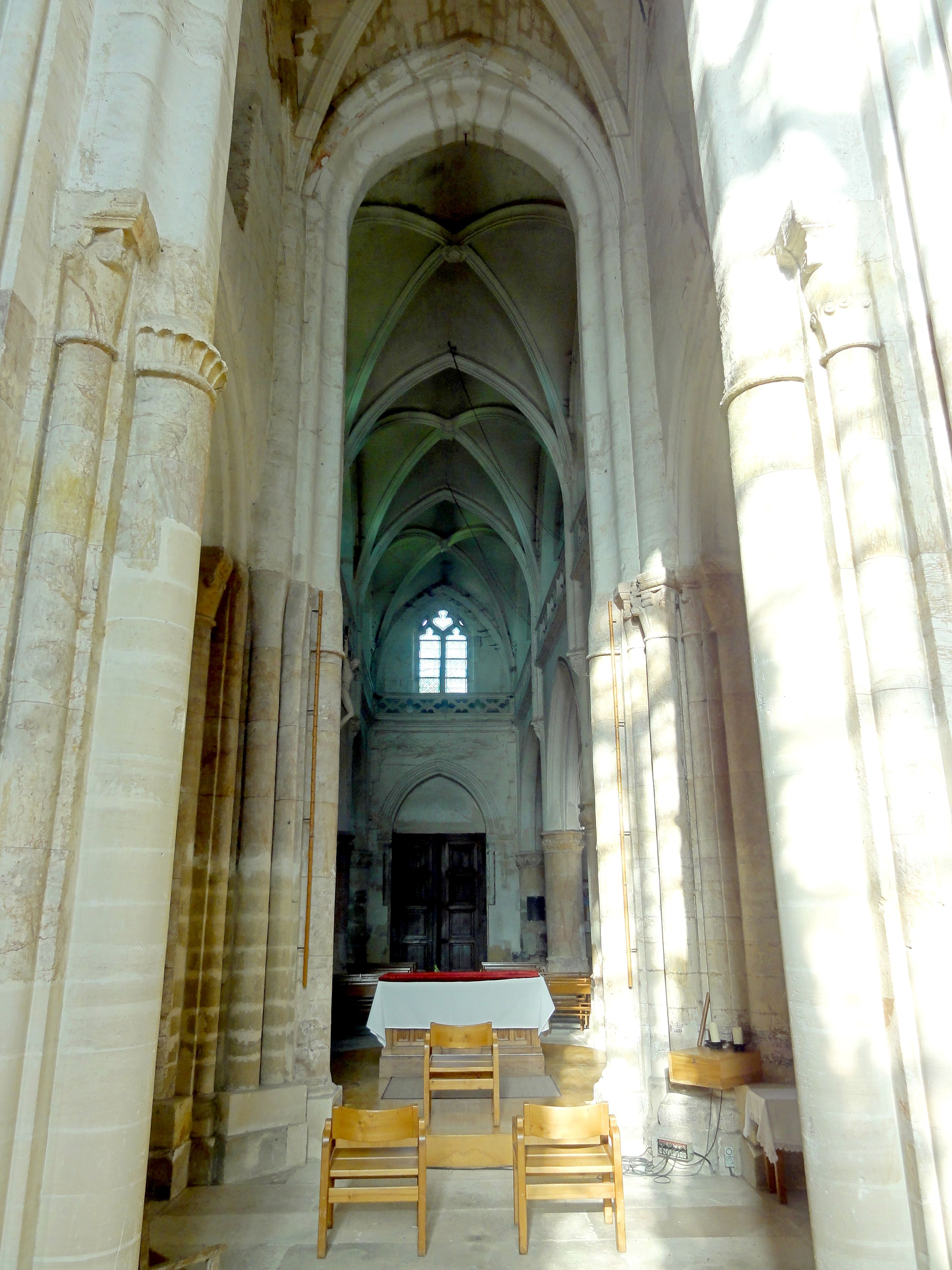 Choeur, vue vers l'ouest.